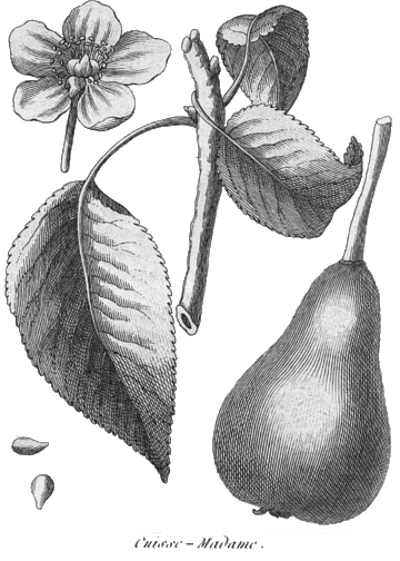 Rozier. Cours d'agriculture, tome 8, planche 2, cuisse-madame (poire)